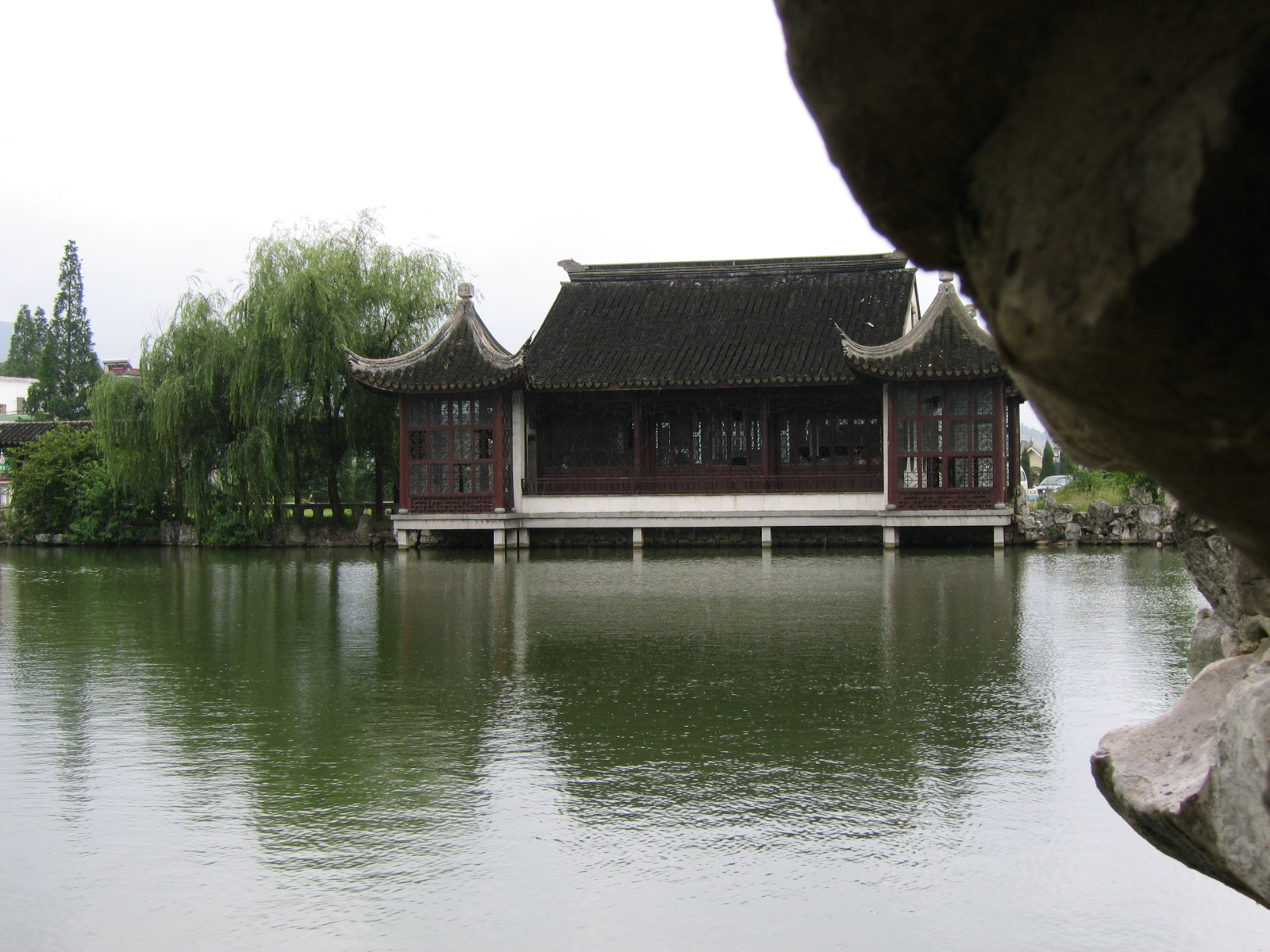 广德太极洞外景 Taiji Cave, Anhui, China